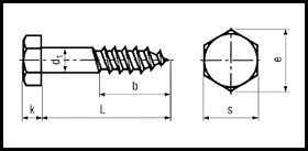 DIN 571